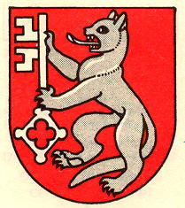 Wappen von Ropraz Kanton Waadt Schweiz